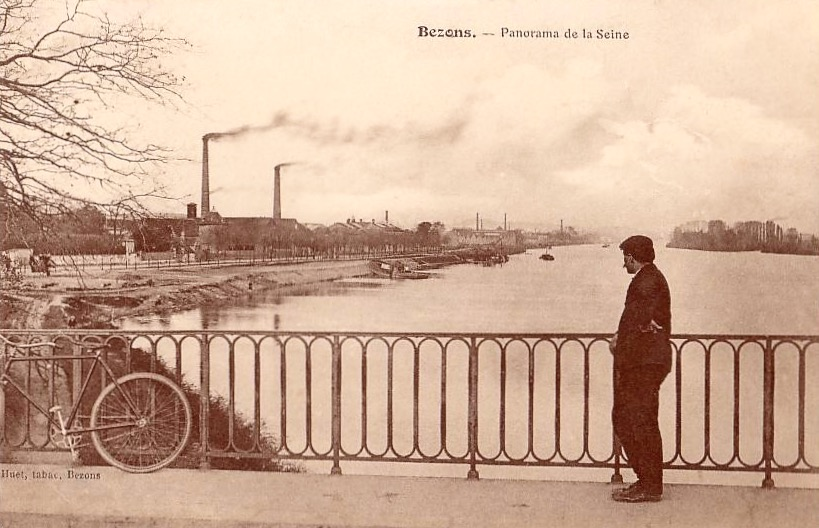 Bezons, panorama de la Seine, carte postale ancienne